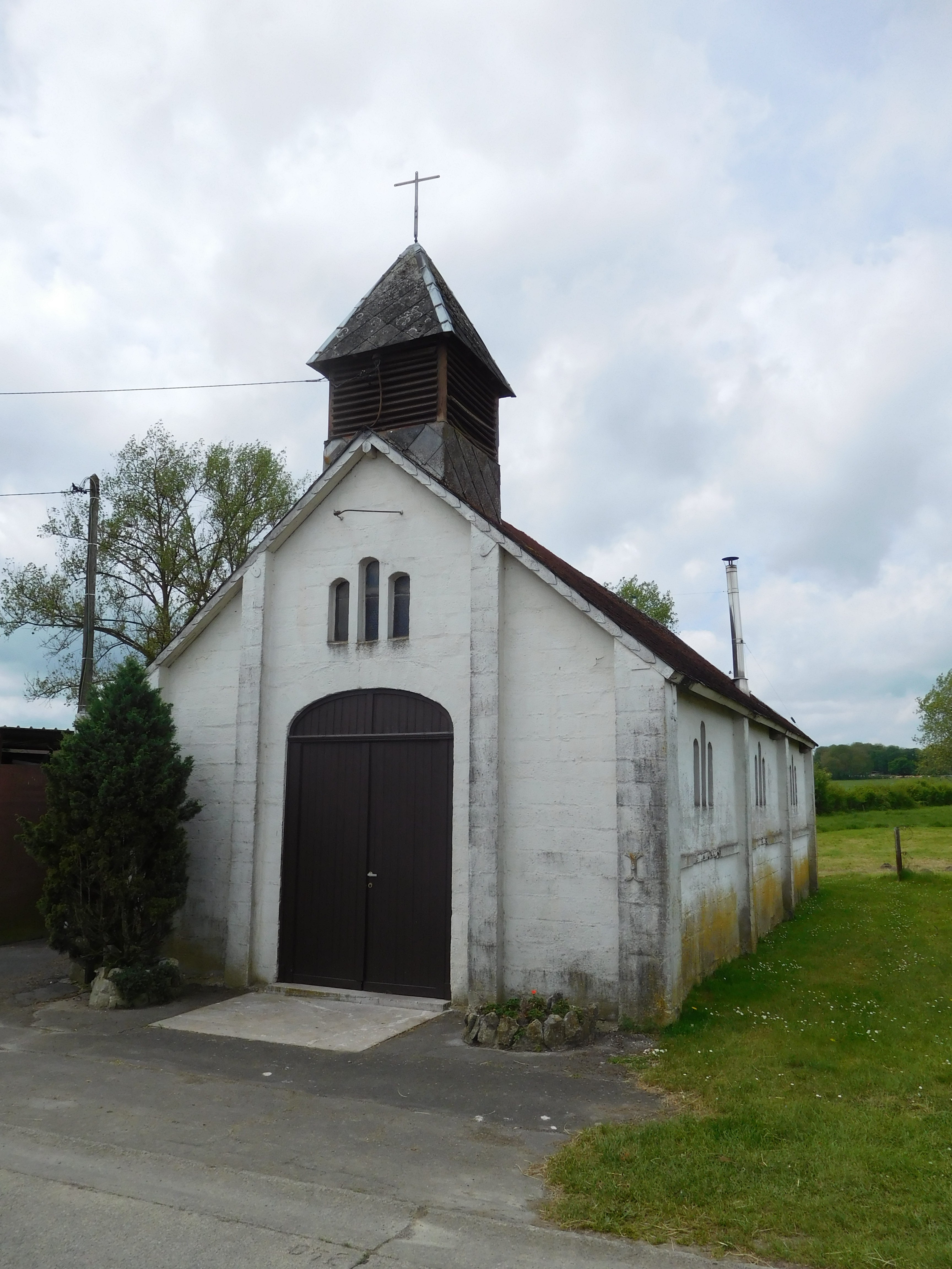 Église-chapelle de Lautenne, hameau de Omezée (commune de Philippeville), en Belgique